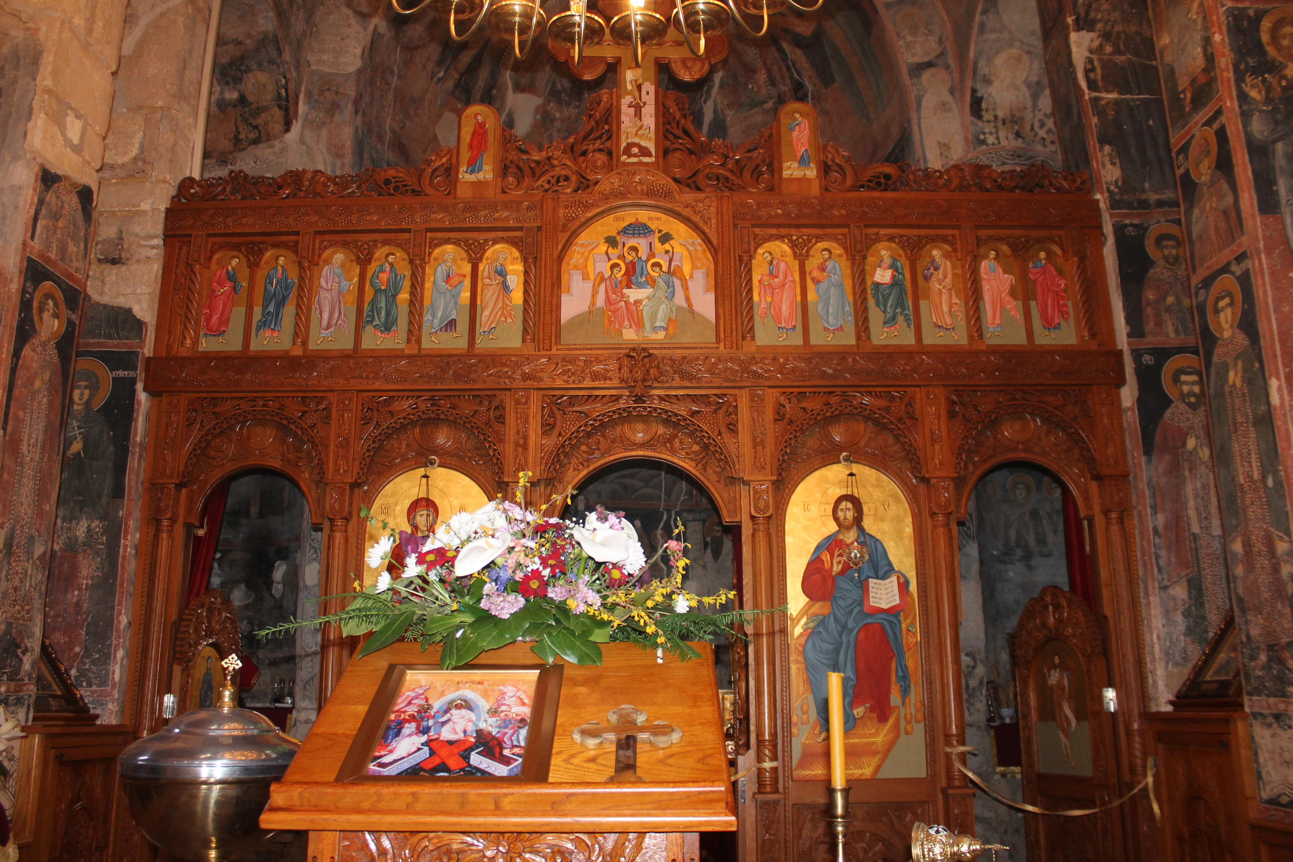 Manastir Svete Petke